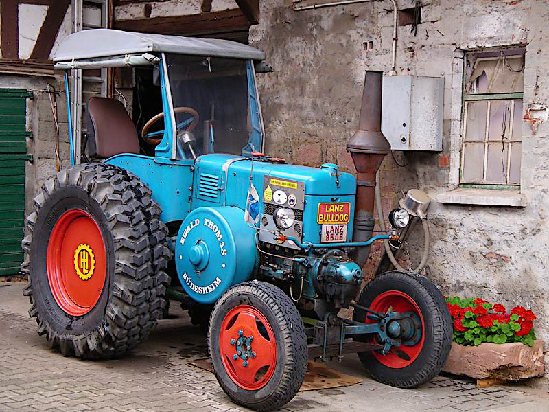 Lanz Bulldog D 8506, Baujahr 1951, 35 PS, Hubraum: 10,3 Liter, Einzylinder-Zweitakt-Glühkopfmotor-Mitteldruckmotor, (Ewald Thomas aus Büdesheim)